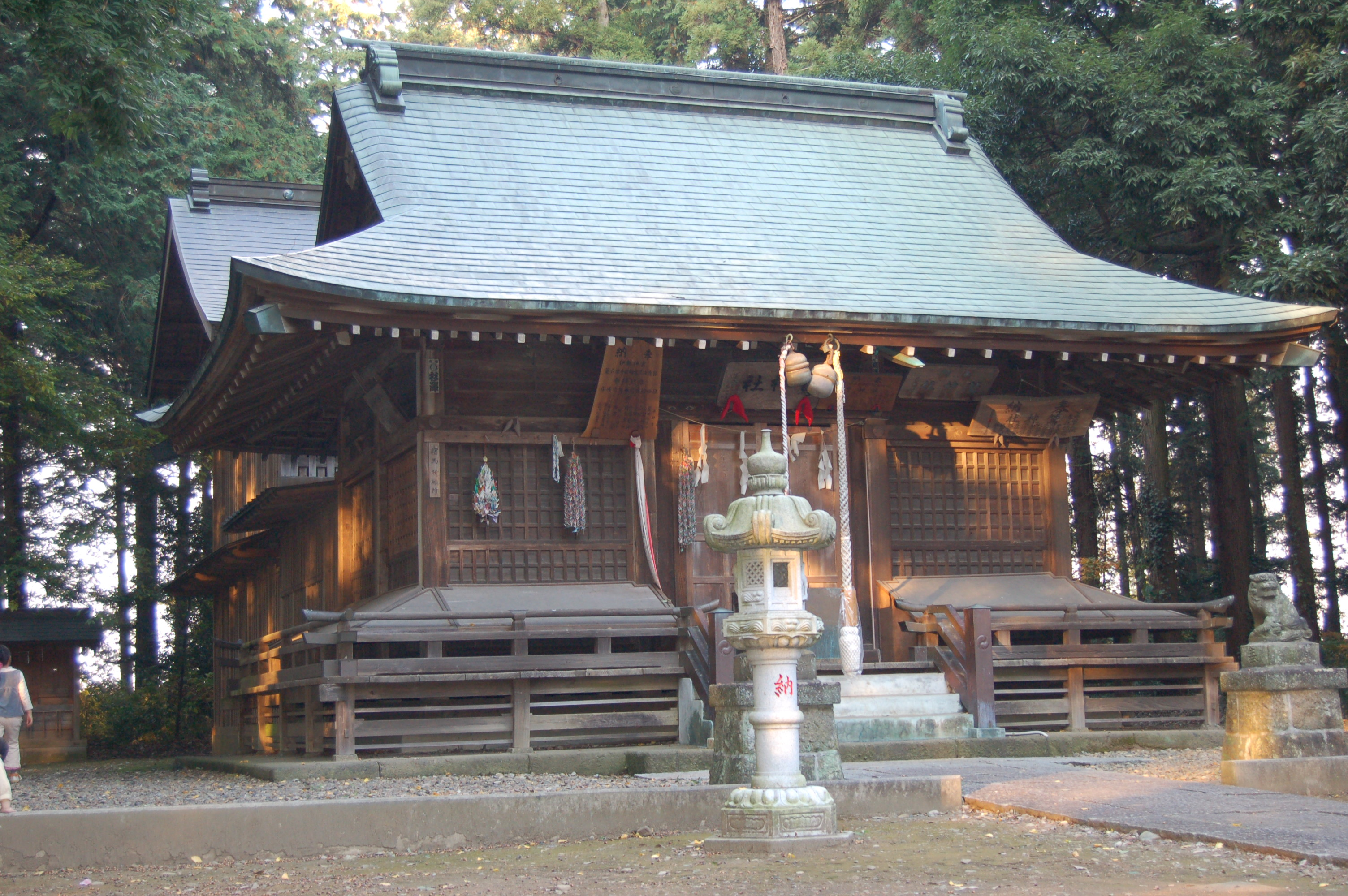 Washi Jinja(shrine) ,Oyama city,Tochigi,Japan